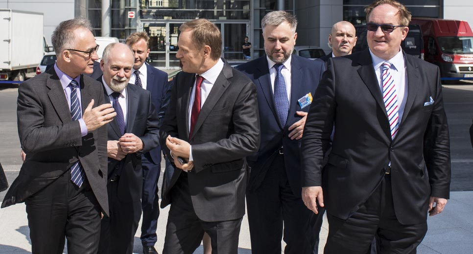 EPP Poznań - Szczyt regionalnych przywódców EPL